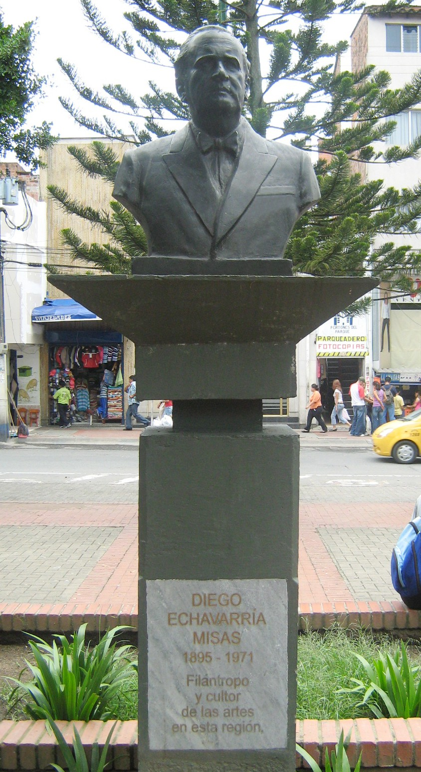 Busto de Diego Echavarría Misas, ubicado en el parque principal del municipio de Itagüí. Colombia.